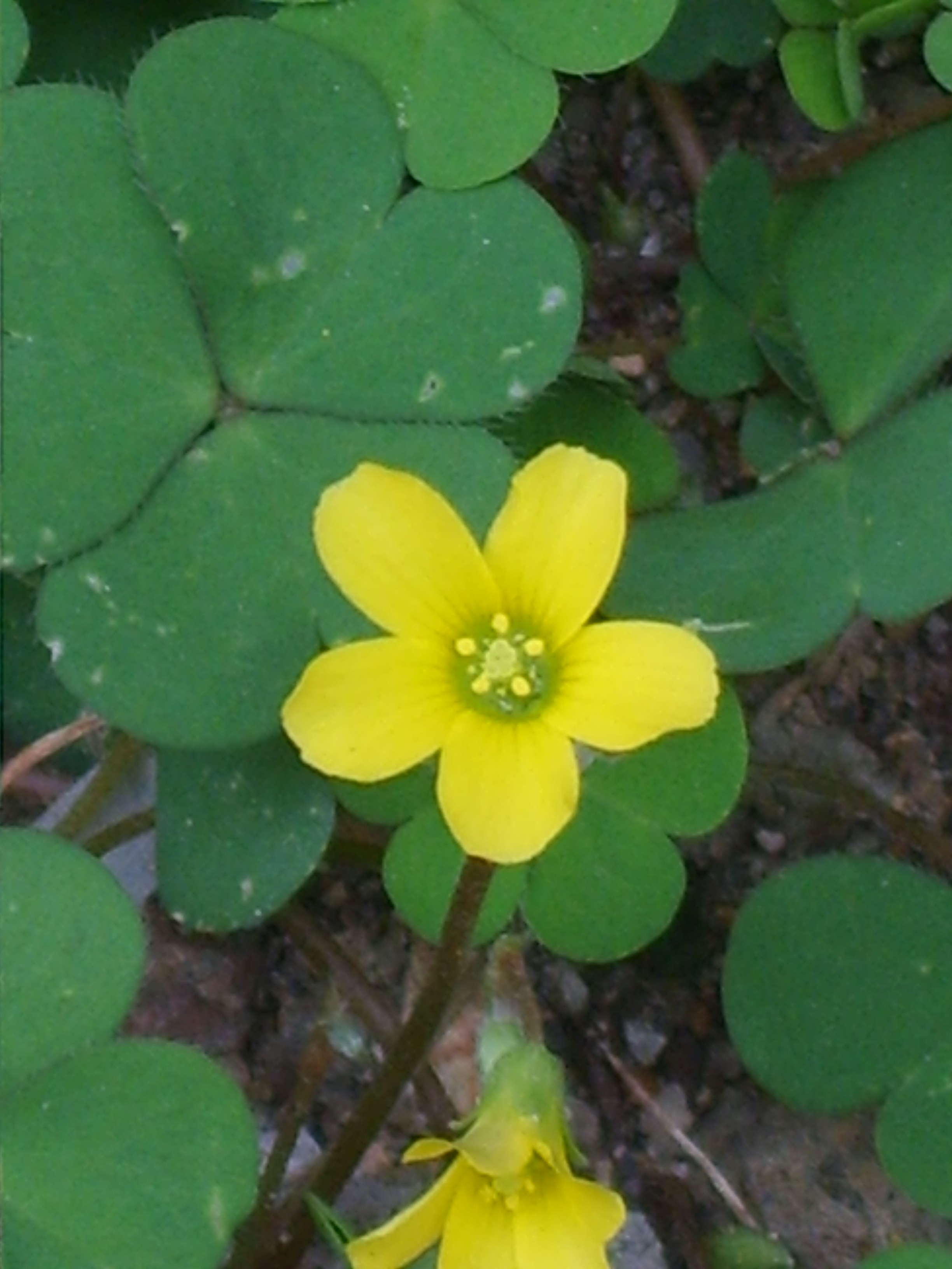 Oxalis corniculata in Bupyung, Korea. 부평 주택가에서 찍은 괭이밥